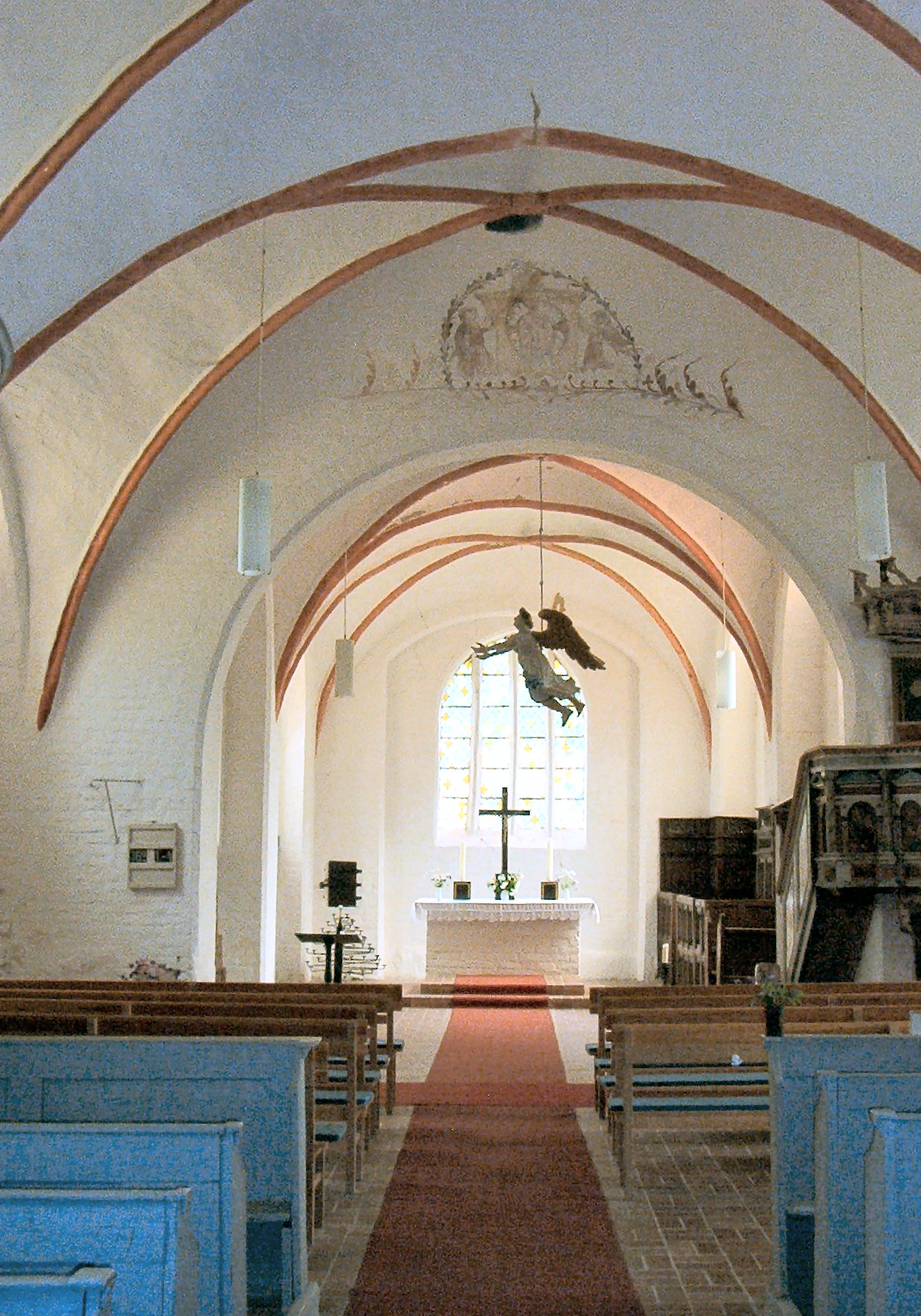 Innenraum der Sankt-Andreas-Kirche in Lancken-Granitz, Rügen, Deutschland